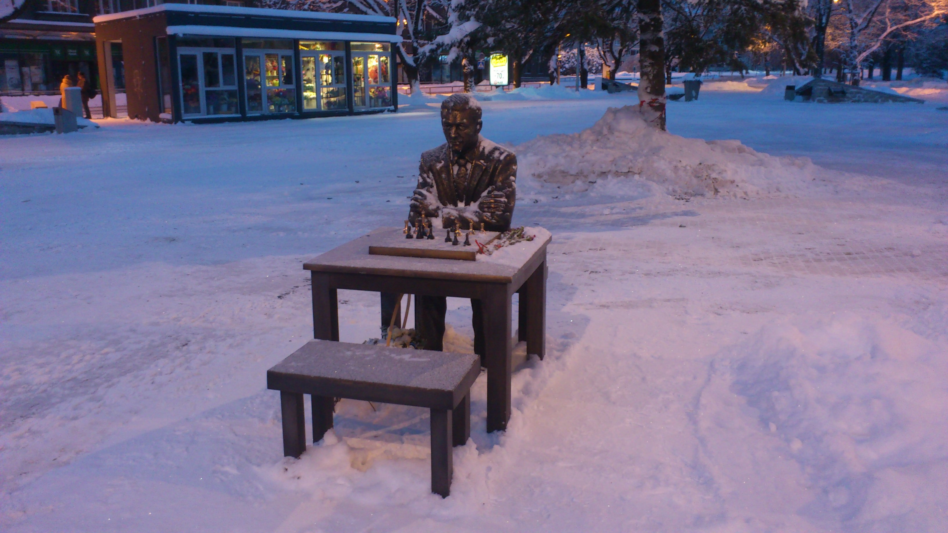 Paul Kerese mälestussammas Narvas (2016)